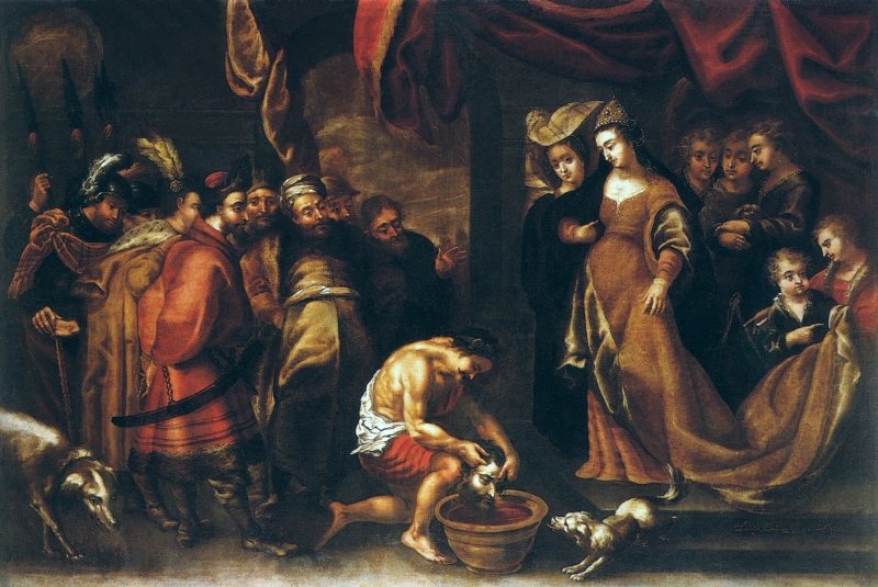 La obra representa a la reina Tomiris sumergiendo en un cubo con sangre la cabeza Ciro II el Grande como venganza por la muerte de su hijo.